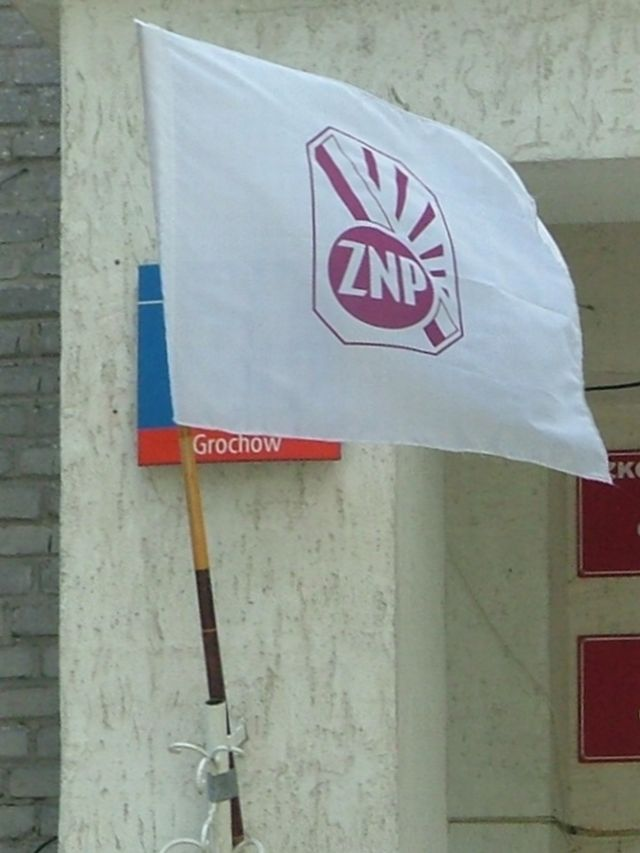 PL, Flaga Związku Nauczycielstwa Polskiego (ZNP)